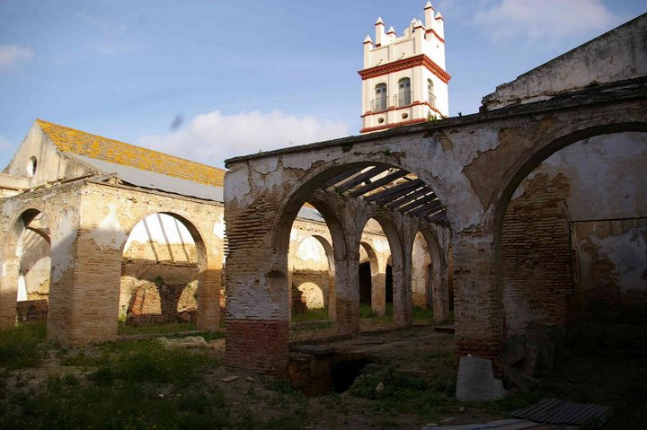 Vista de los almacenes traseros y torre de la Casa de Arizón en Sanlúcar de Barrameda